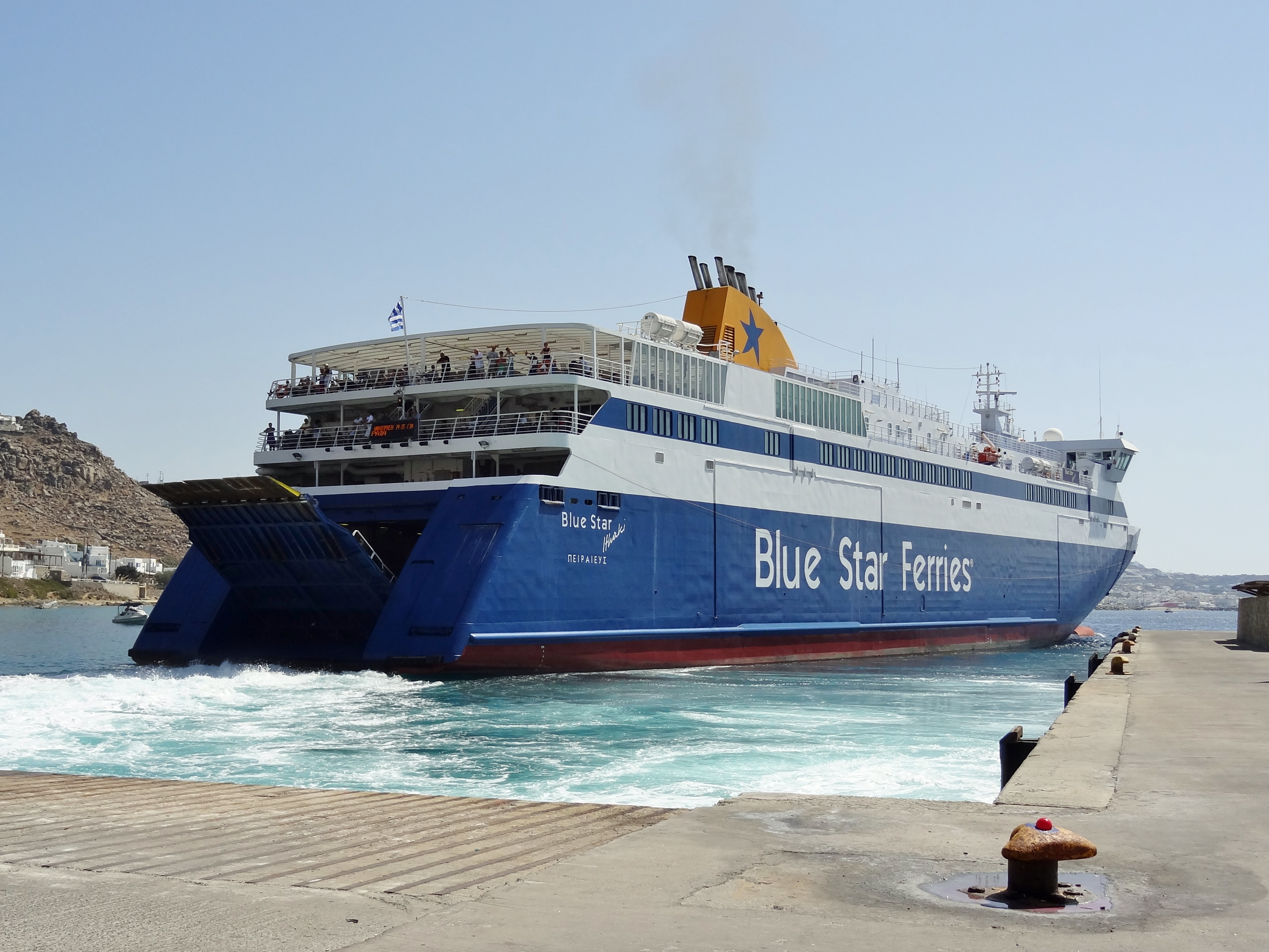 Fähre Ithaki der Gesellschaft Blue Star Ferries im Hafen von Tourlos auf Mykonos, Kykladen, Griechenland